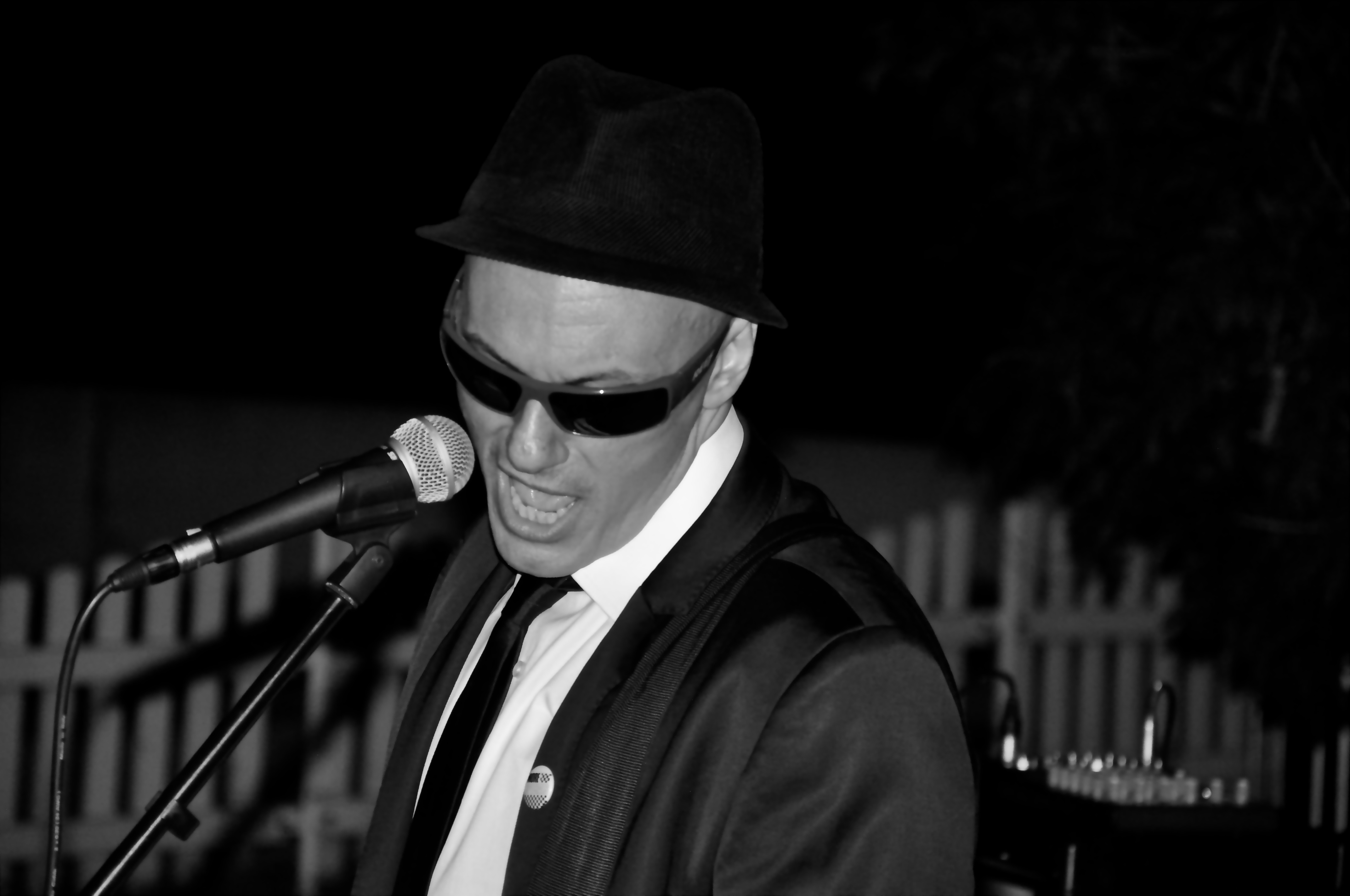 Recital Evento Eurucamp, Mögglesee Hotel, Berlín, Alemania - Agosto de 2012